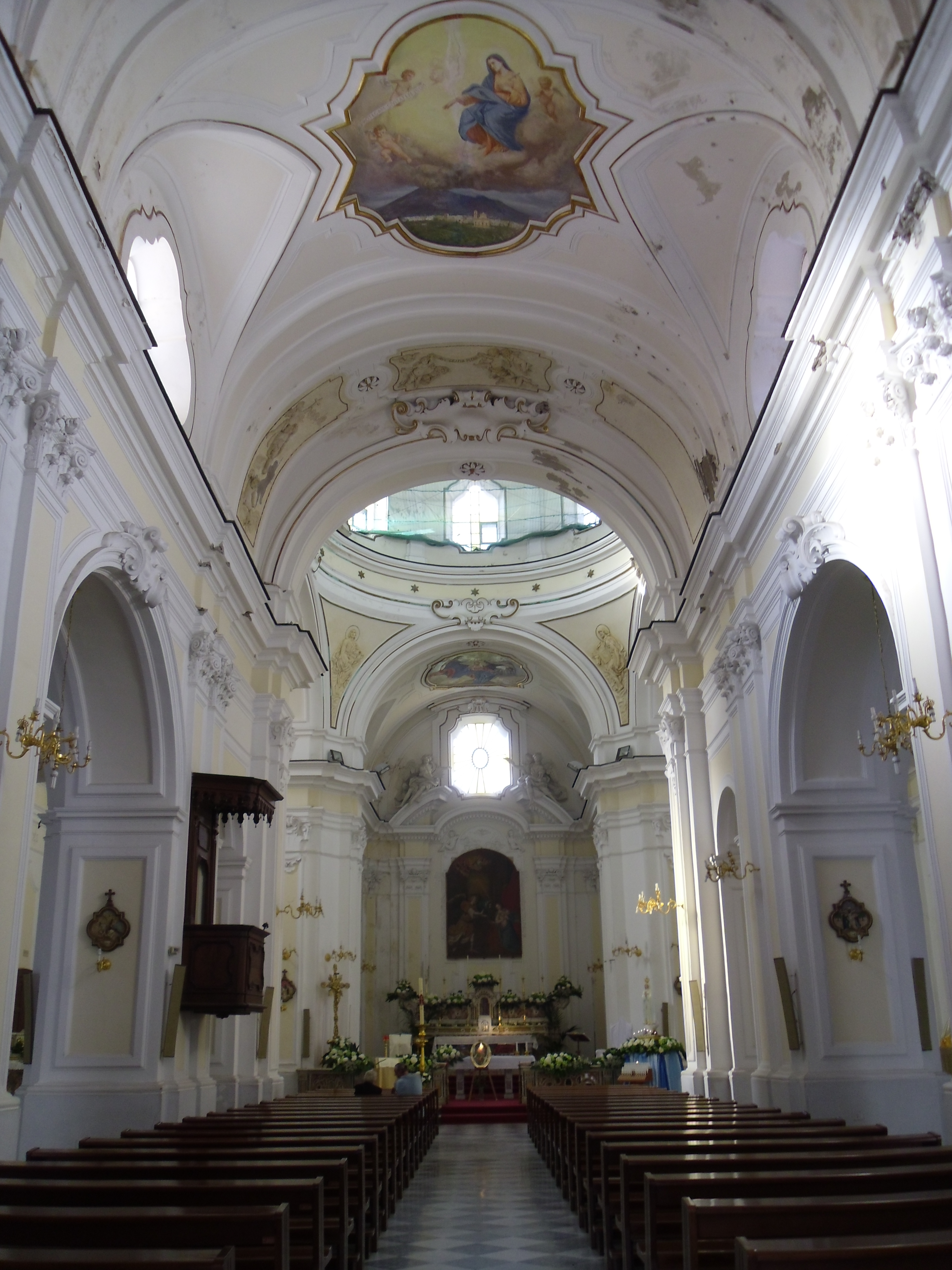 Interno della chiesa dell'Ave Gratia Plena con l'affresco dell'Addolorata che protegge Boscotrecase, i bassorilievi di Antonio Mennella, le dorature del De Bernardis e il pulpito settecentesco.